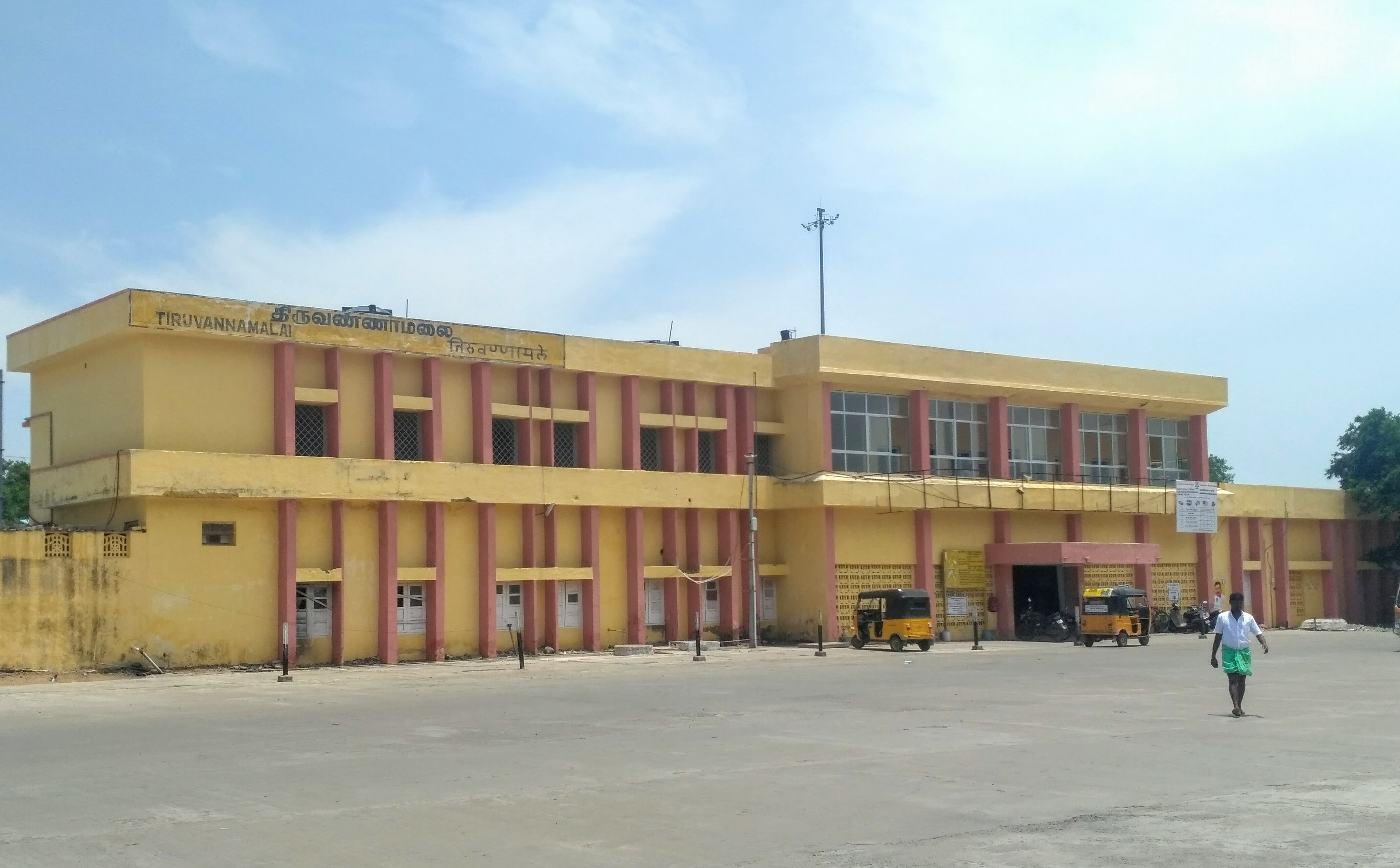 திருவண்ணாமலை இரயில் நிலையத்தின் நுழைவாயில்..